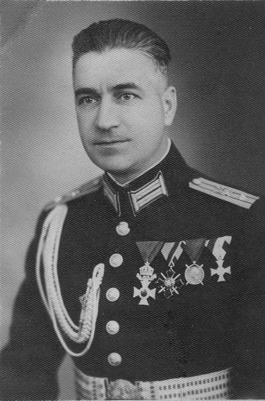 Nicola Popoff, 1943 Nicola Popoff Own foto Никола Попов, 1943